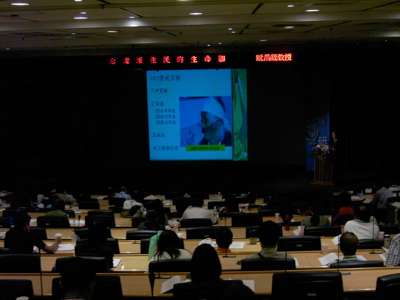 行政院原住民族委員會主辦、國立臺灣大學原住民族研究中心執行、國立臺灣大學第二學生活動中心國際會議廳舉行第一屆臺灣原住民族生物學誌研討會，阮昌銳主講「臺灣原住民的生命觀」。